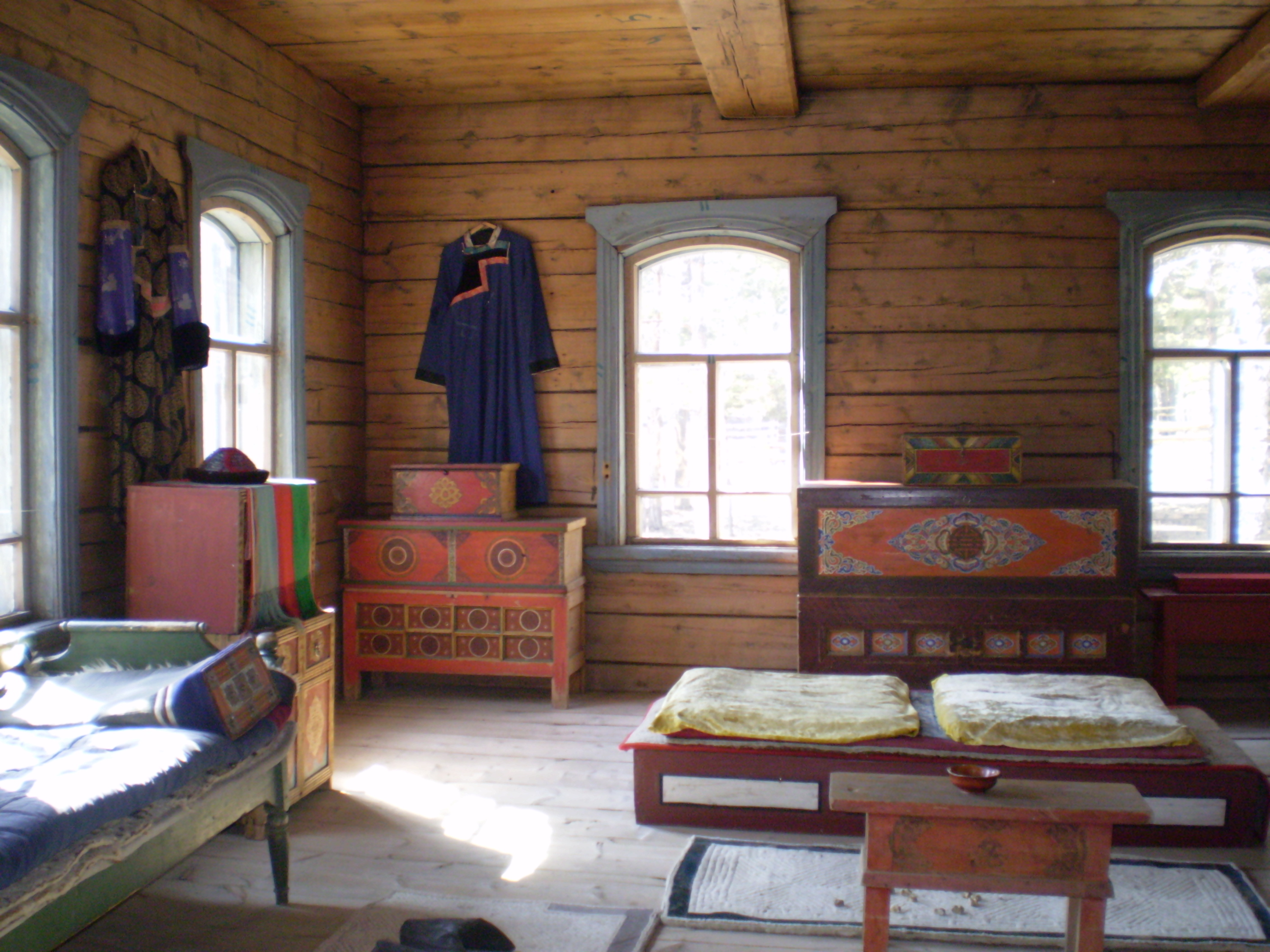 Комната бурятского дома